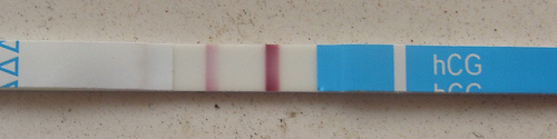 positive pregnancy test strip